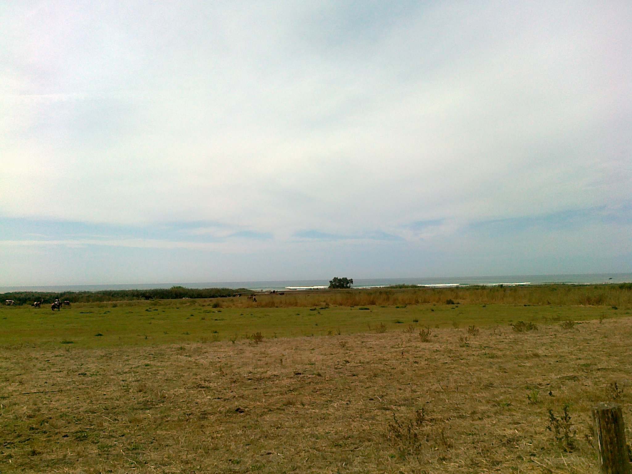 Torre di Palidoro. Luogo della Fucilazione di Salvo d'Acquisto. Mare antistante